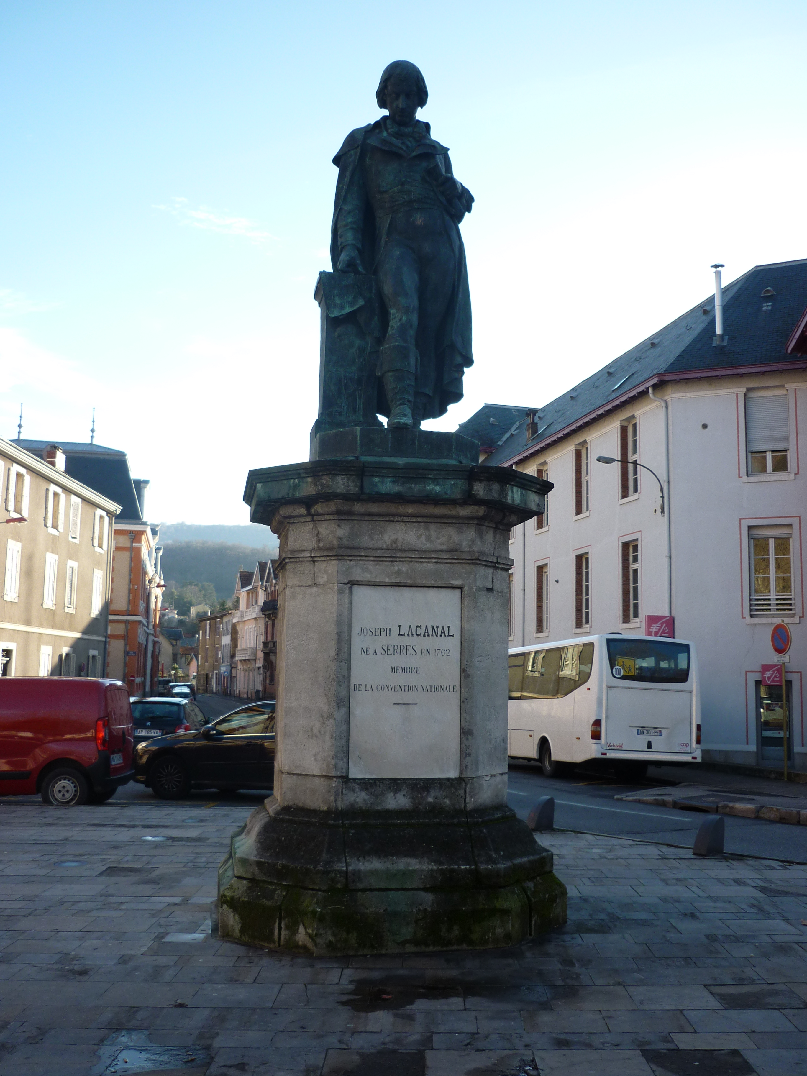 Émile Picault, Monument à Joseph Lakanal, 1882, bronze, centre ville de Foix (Ariège, France). Inscription sur le piédestal : « Joseph Lacanal, né a Serres en 1762, membre de la convention nationale ».